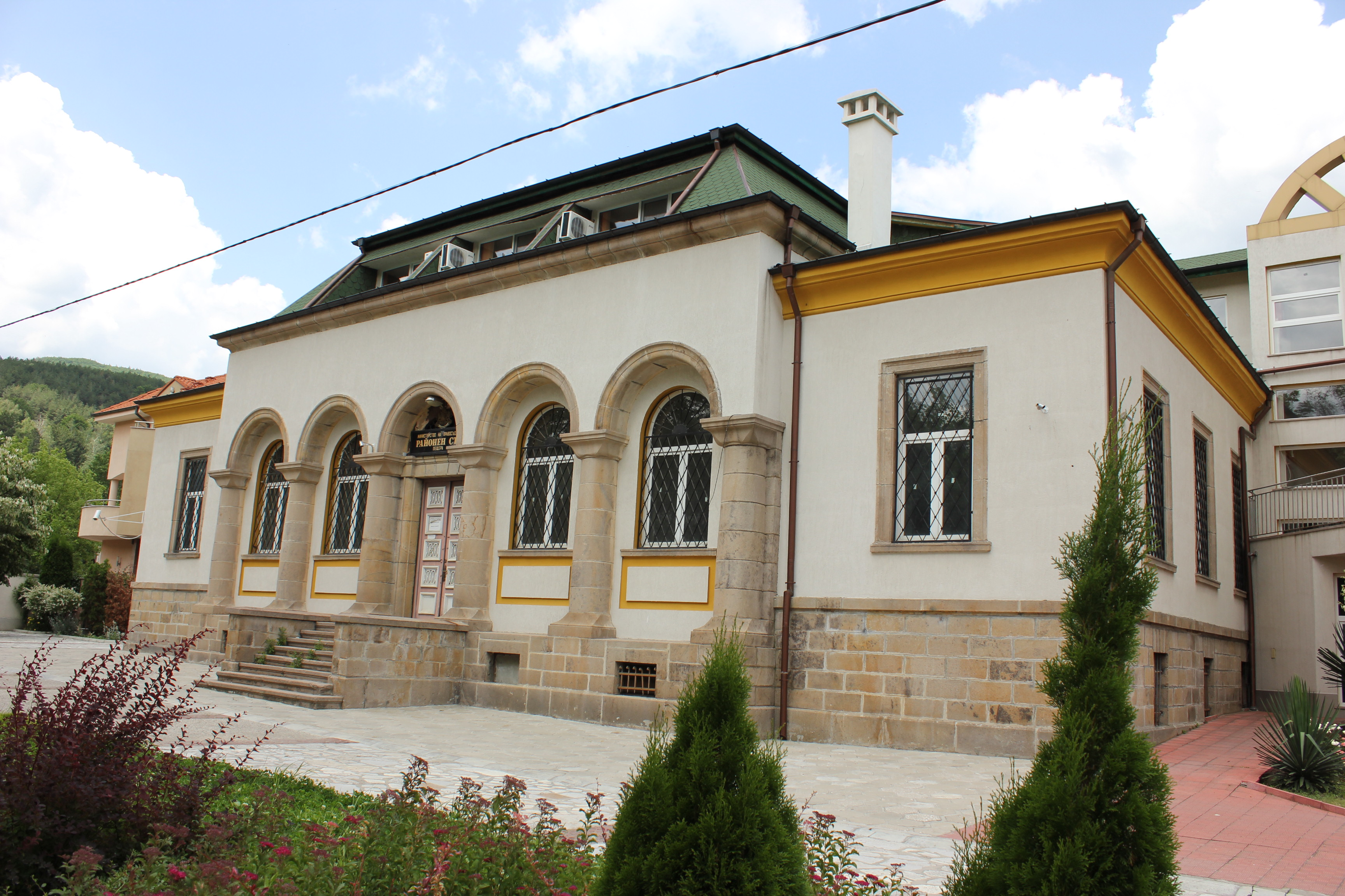 Сградата на районния съд в град Пещера, България.